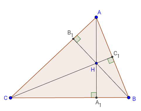 Дане зображення ілюструє теорему про те, що в довільному трикутнику три його висоти перетинаються в одній точці, яка називається ортоцентром. Зображення виконано за допомогою програми GeoGebra.